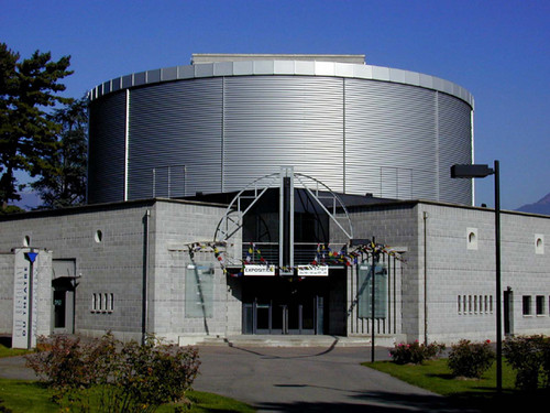 Théâtre du Crochetan Monthey